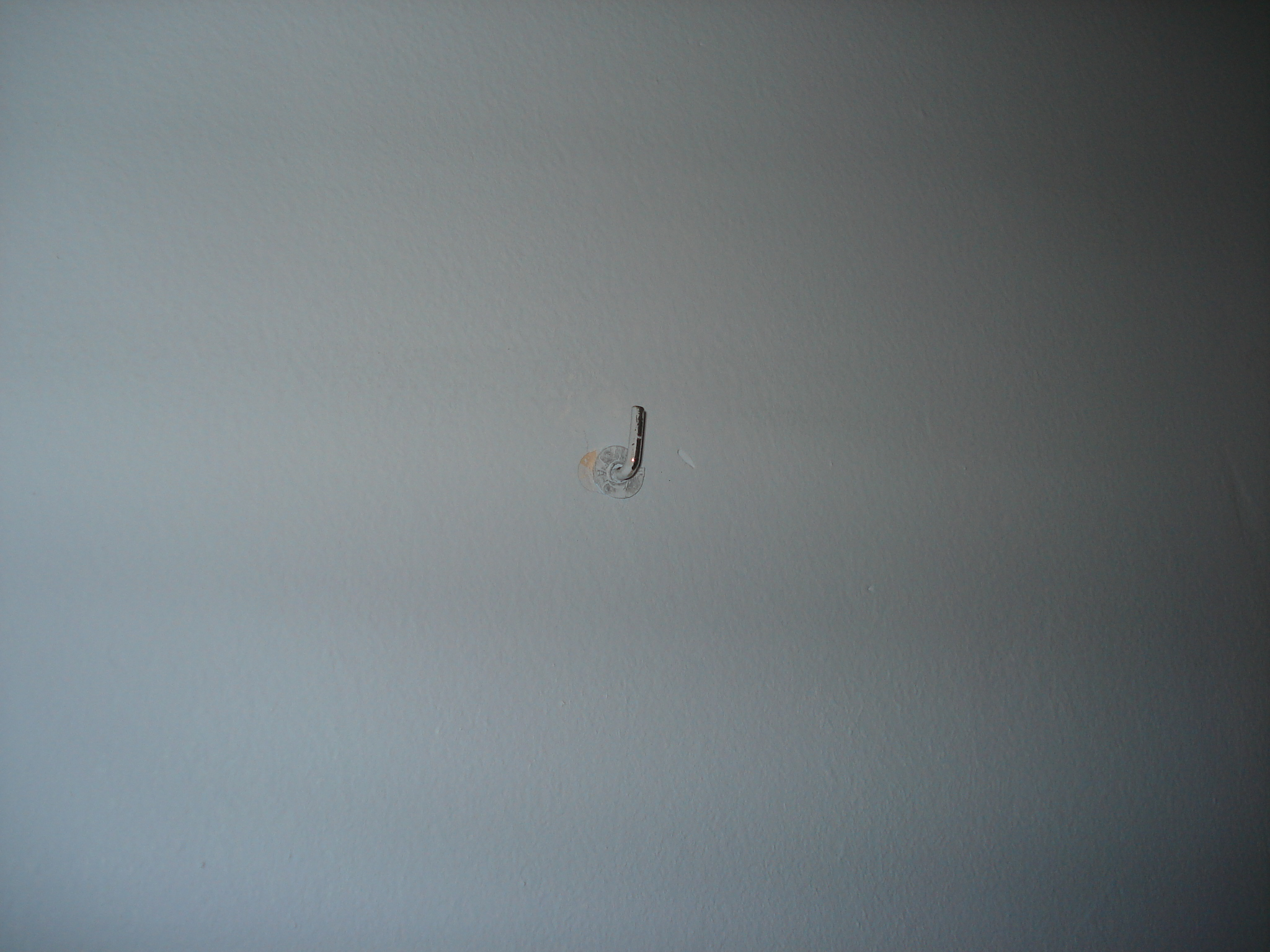 Alcayata colocada sobre pared con espiche